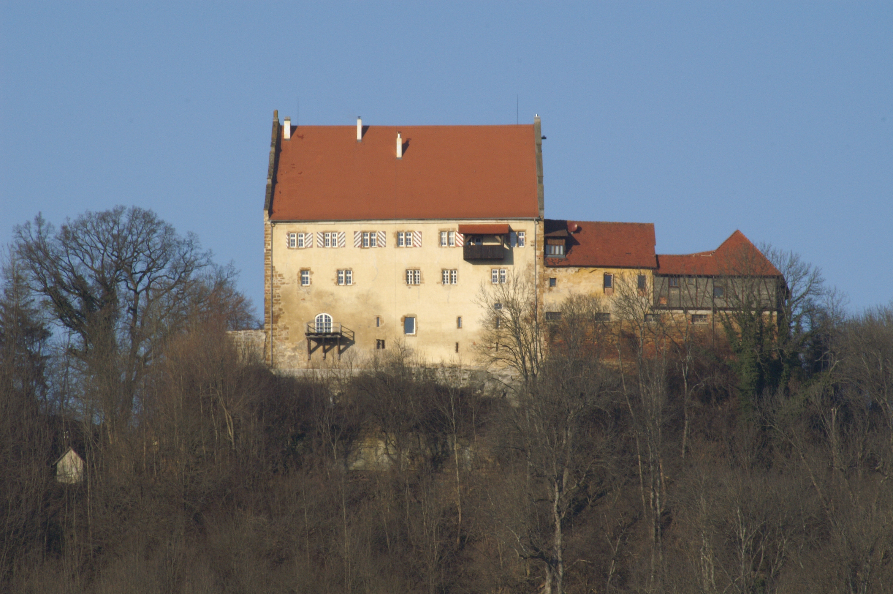 Schloß Ramsberg im mittleren Filstal